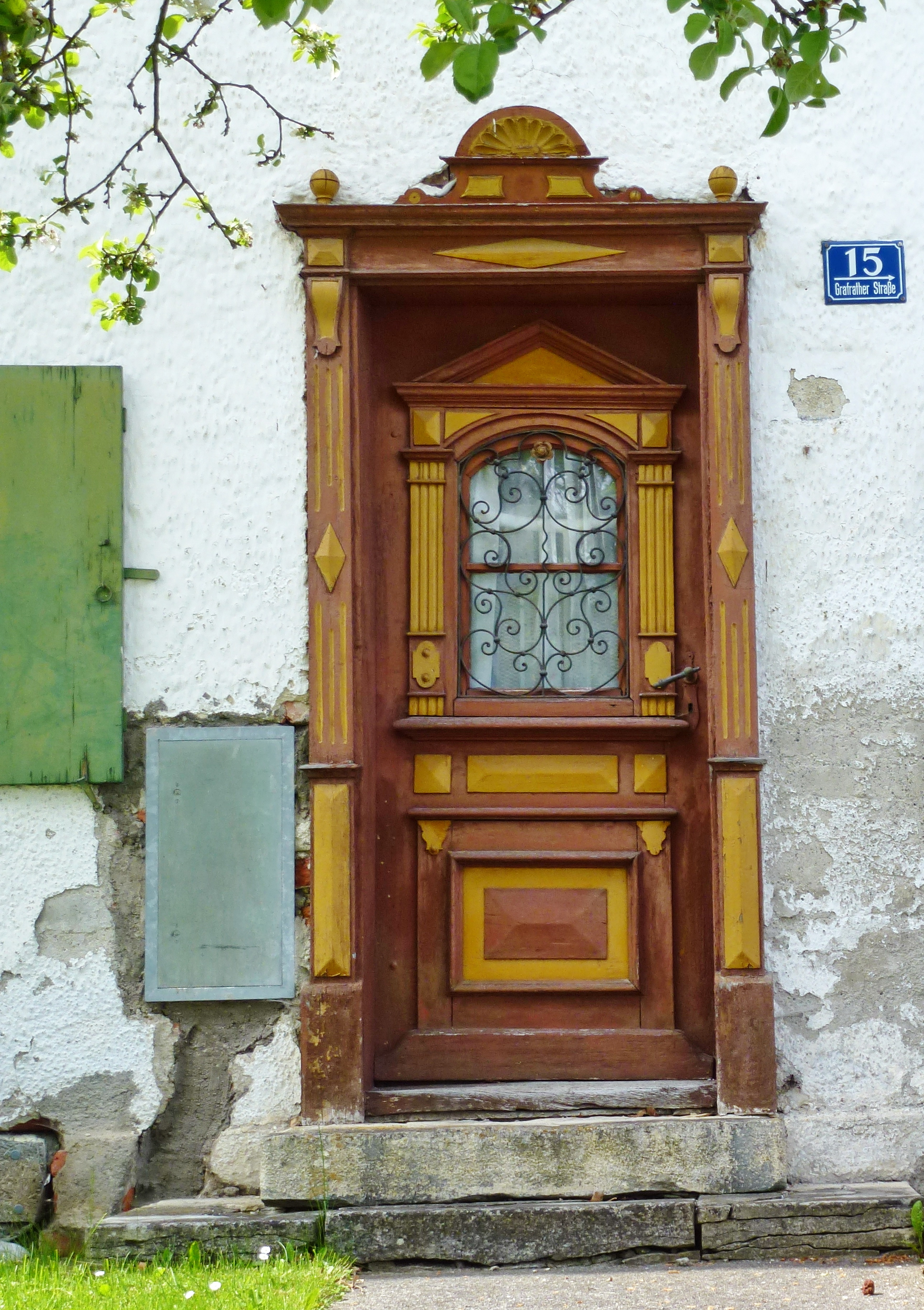 Kottgeisering, Grafrather Str. 15: Ehemaliges Bauernhaus. Detail: Holztür